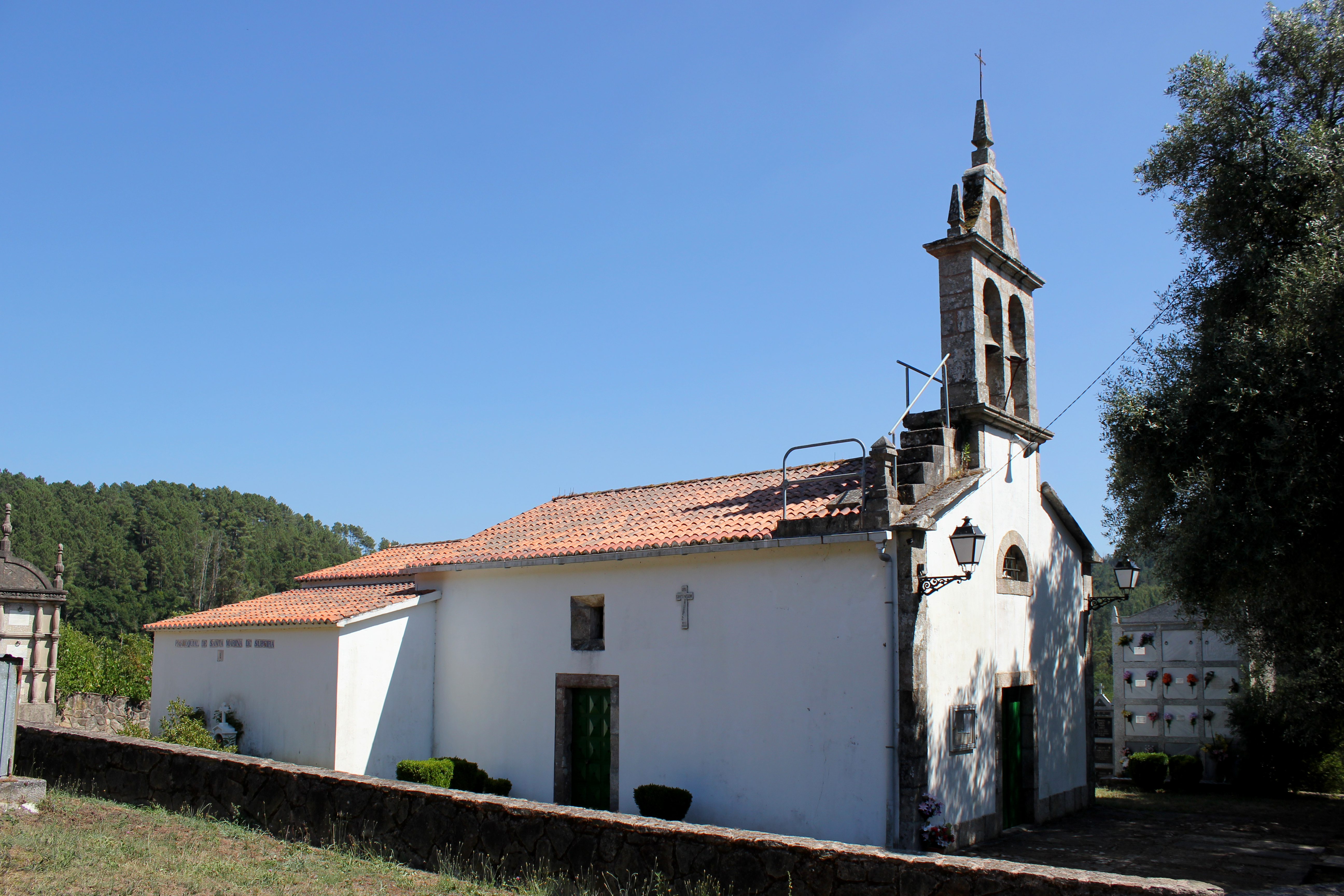 Igrexa de Santa Mariña de Sucira, no concello de Boqueixón.